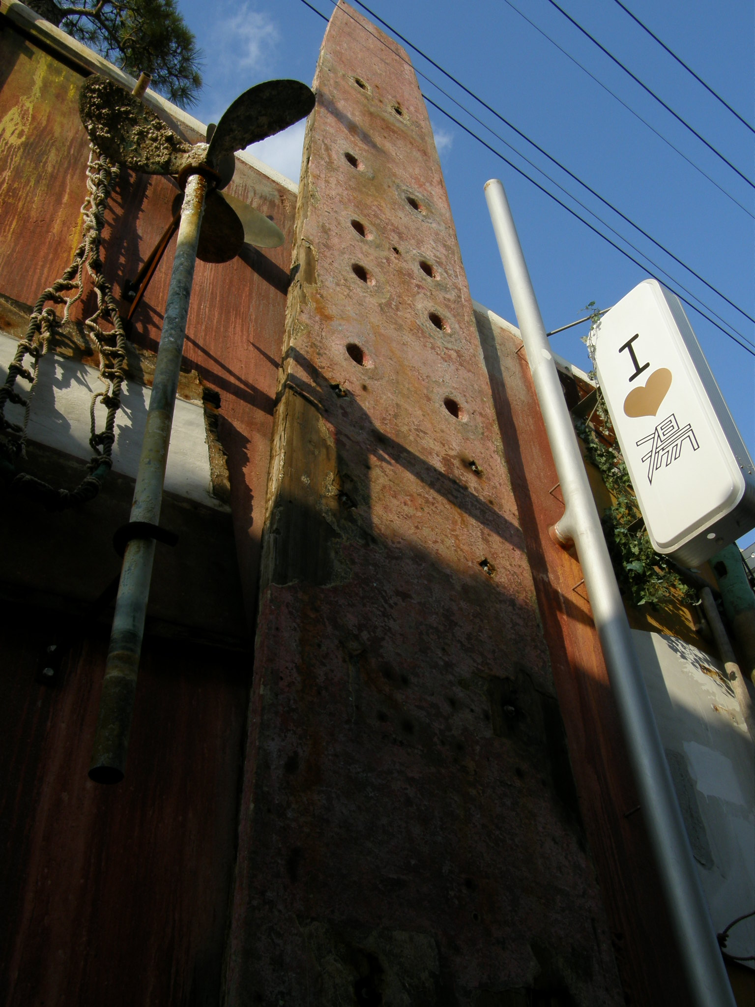 Naoshima Bath I♥湯 直島銭湯 Photo by Akiyoshi Matsuoka